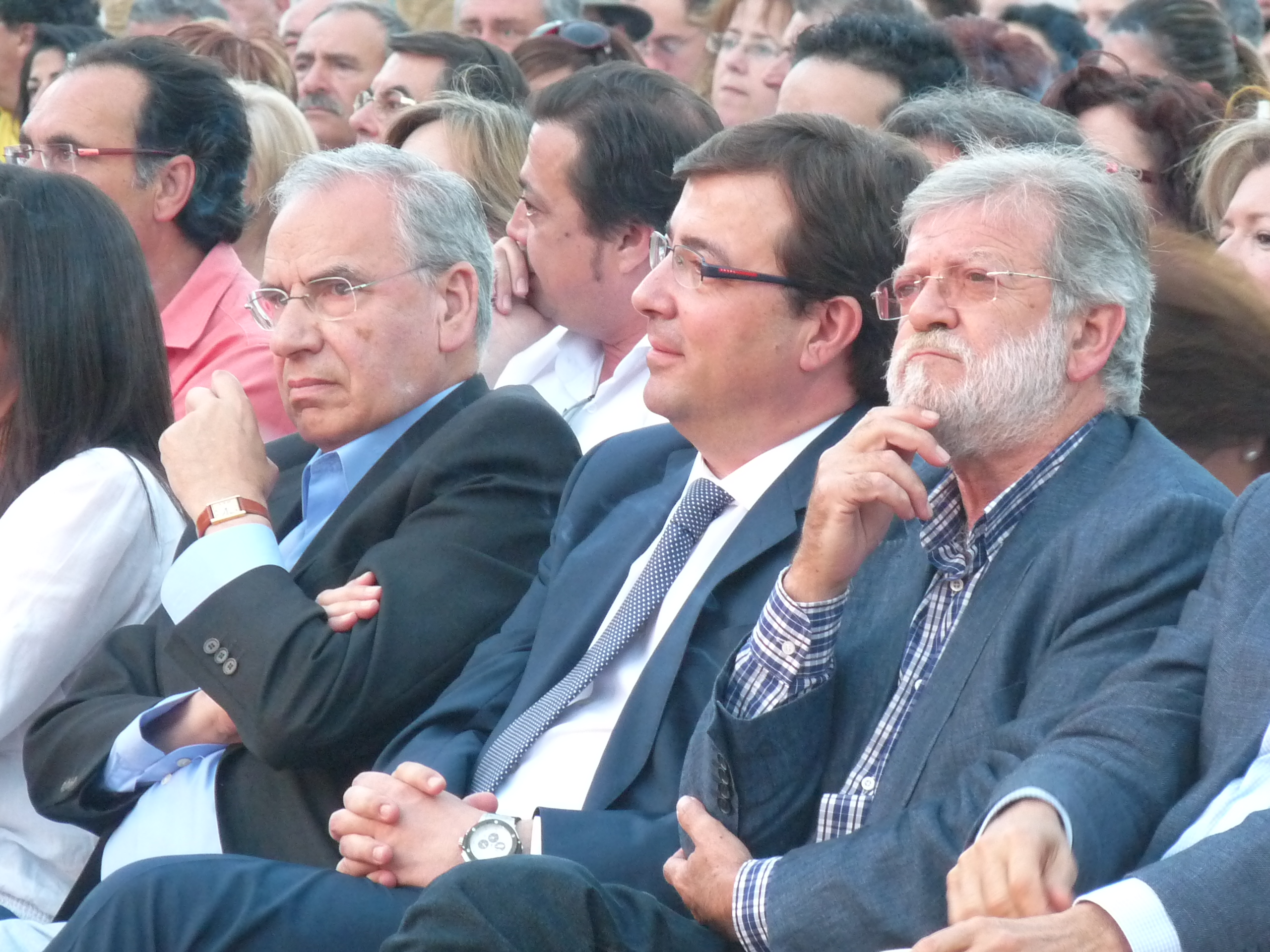 Alfonso Guerra, Juan Carlos Rodríguez Ibarra y Guillermo Fernández Vara en un acto público del PSOE en Badajoz